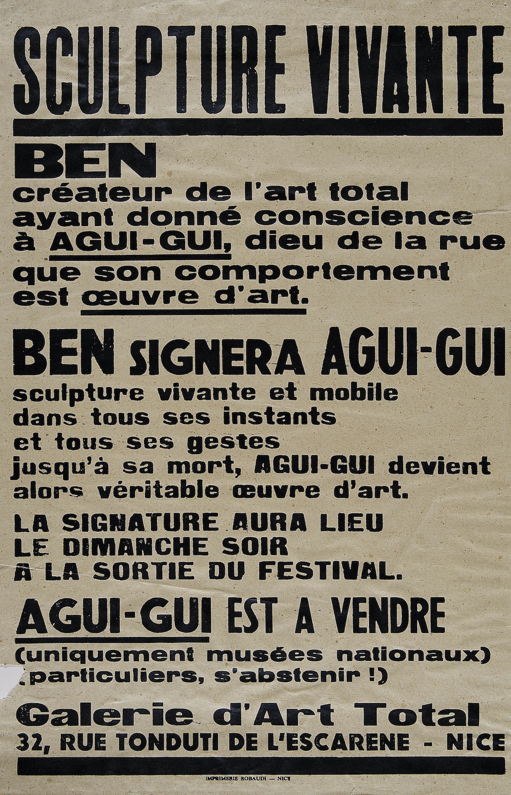 Tract